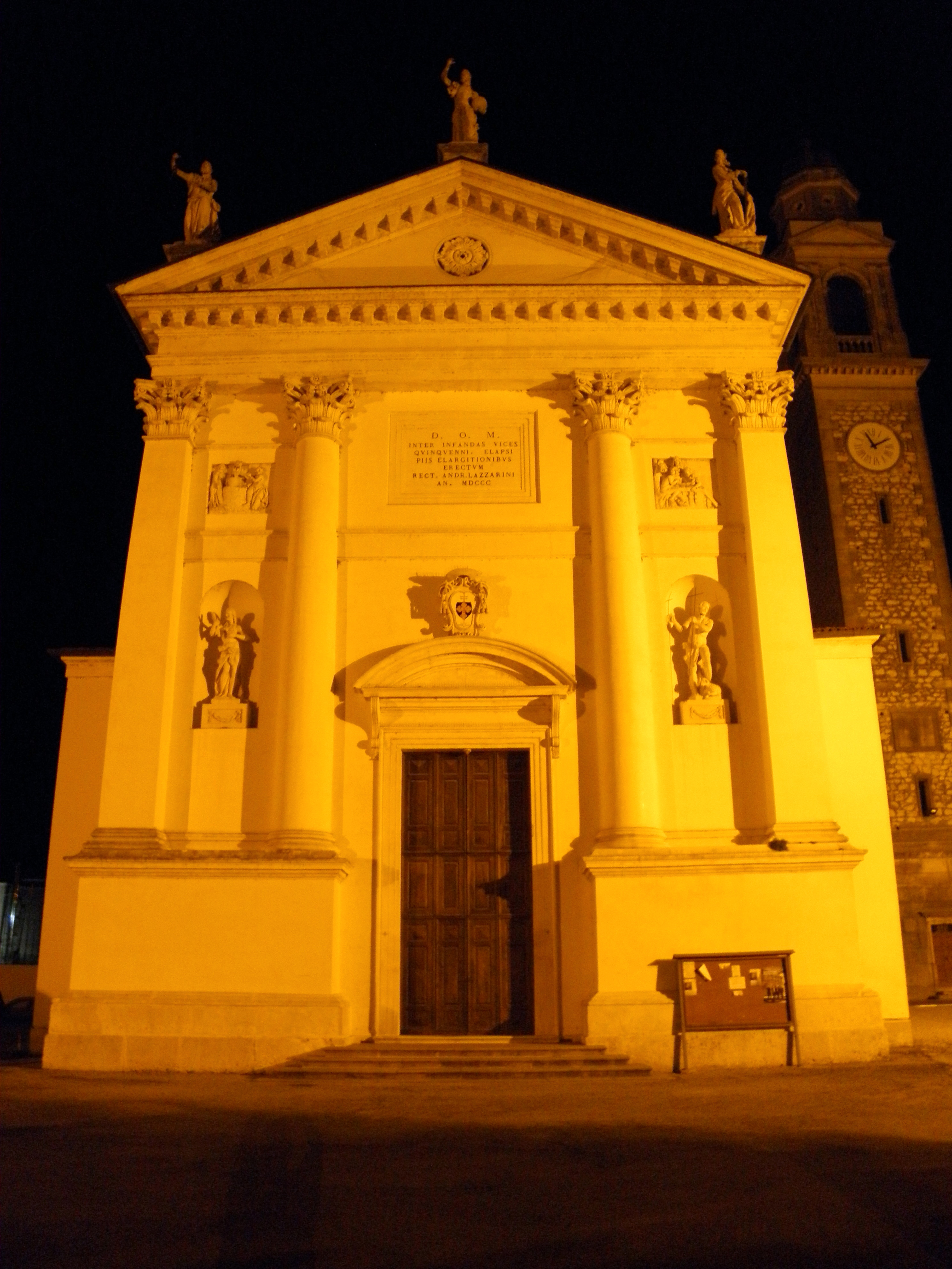 Longare: vista notturna della chiesa parrocchiale di Santa Maria Maddalena.